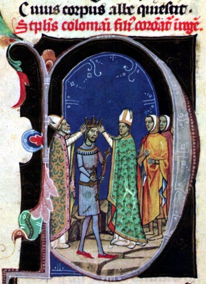 II. István koronázása (Képes Krónika)